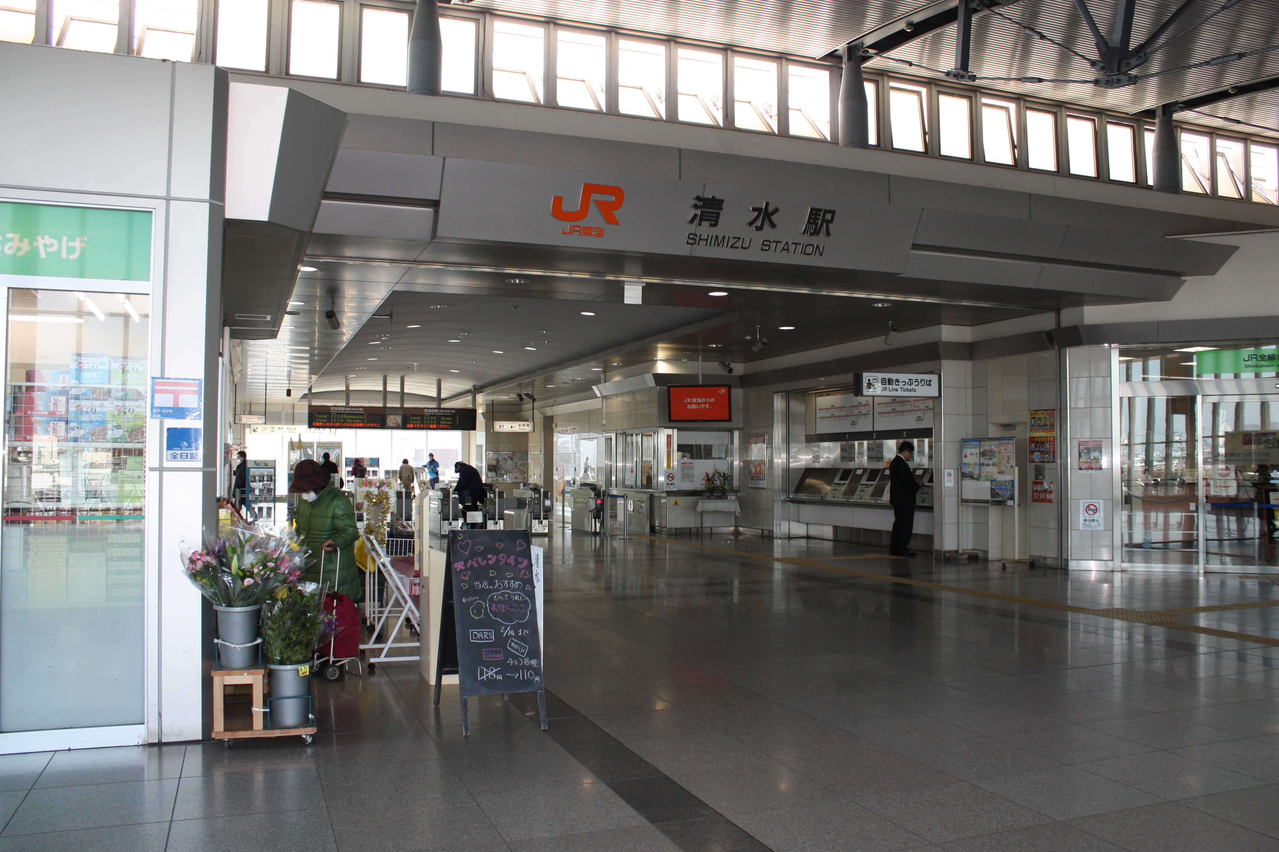 清水駅 改札口